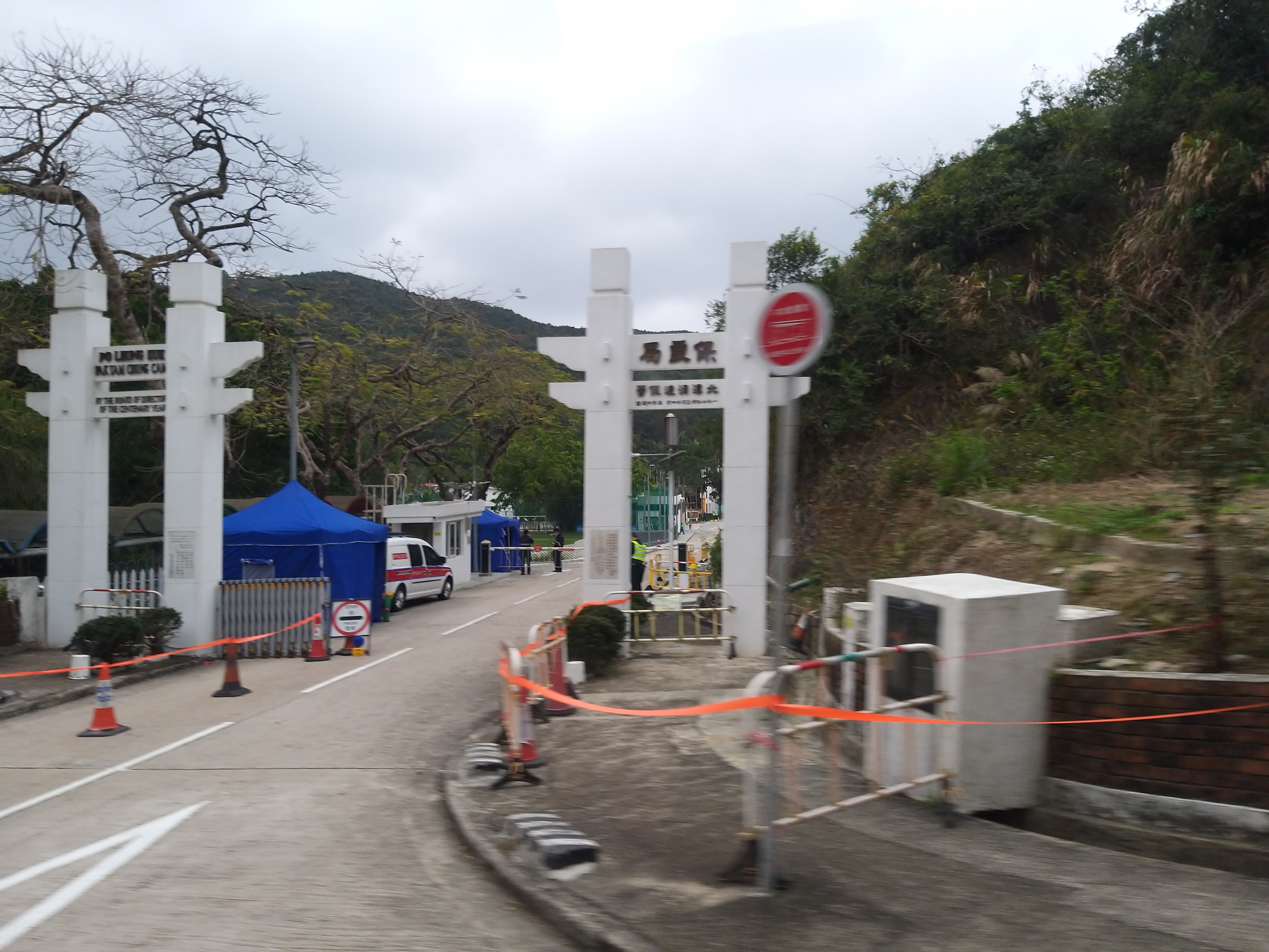 被改作武漢肺炎隔離營的保良局北潭涌渡假營，入口設有警方的門崗